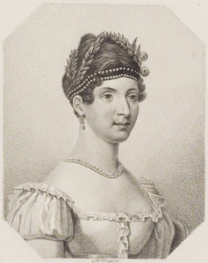 Angelica Catalani (* 10. Mai 1780; † 13. Juni 1849)